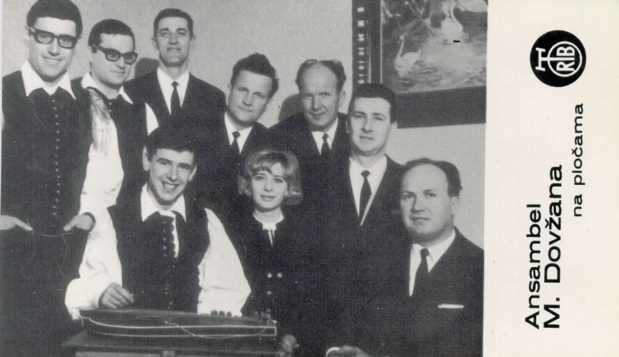 Ansambel Mihe Dovžana